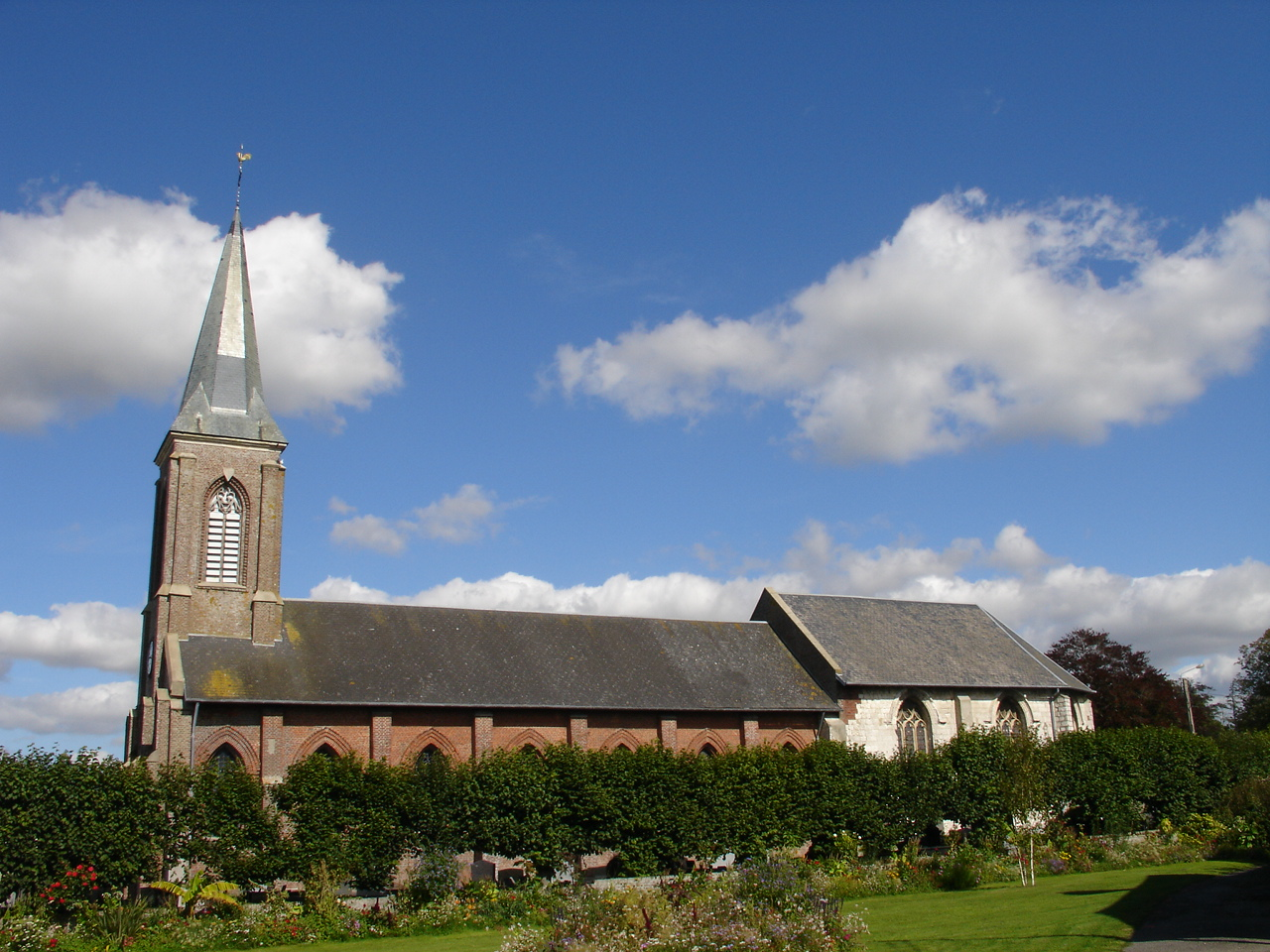 Église de Saint-Josse